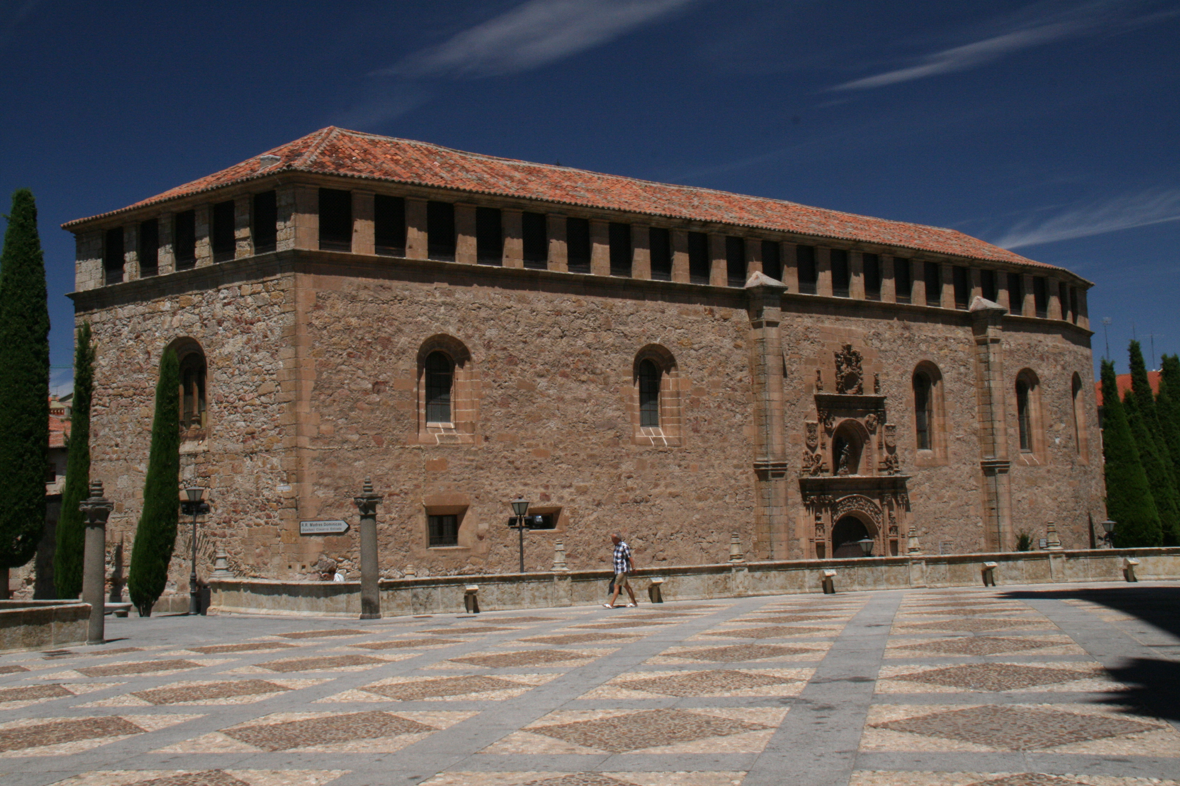 Dueñas